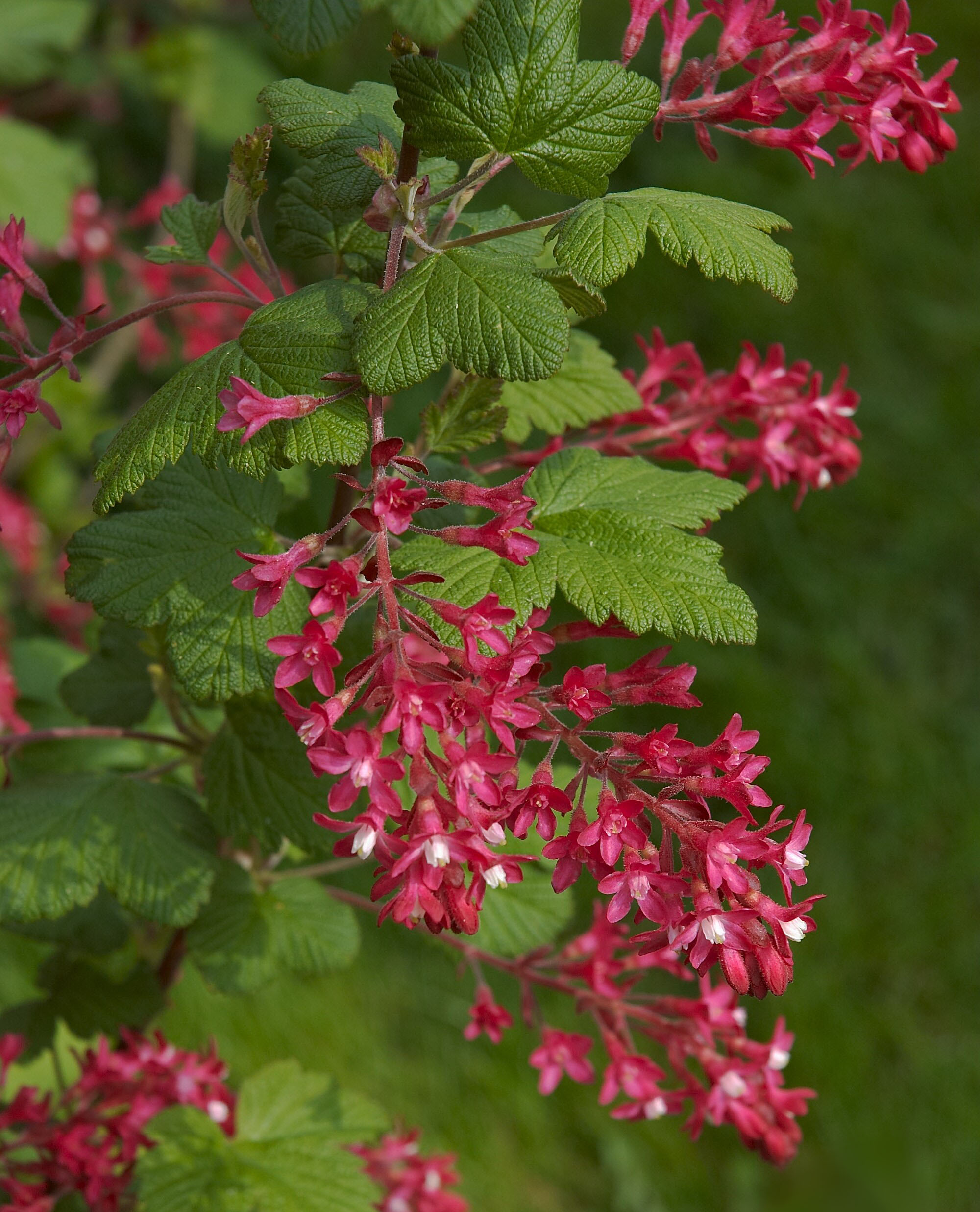 Ribes sanguineum 'King Ed. VIII'